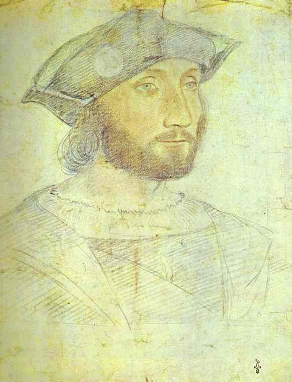 Portrait of Guillaume Gouffier, Seigneur de Bonnivet